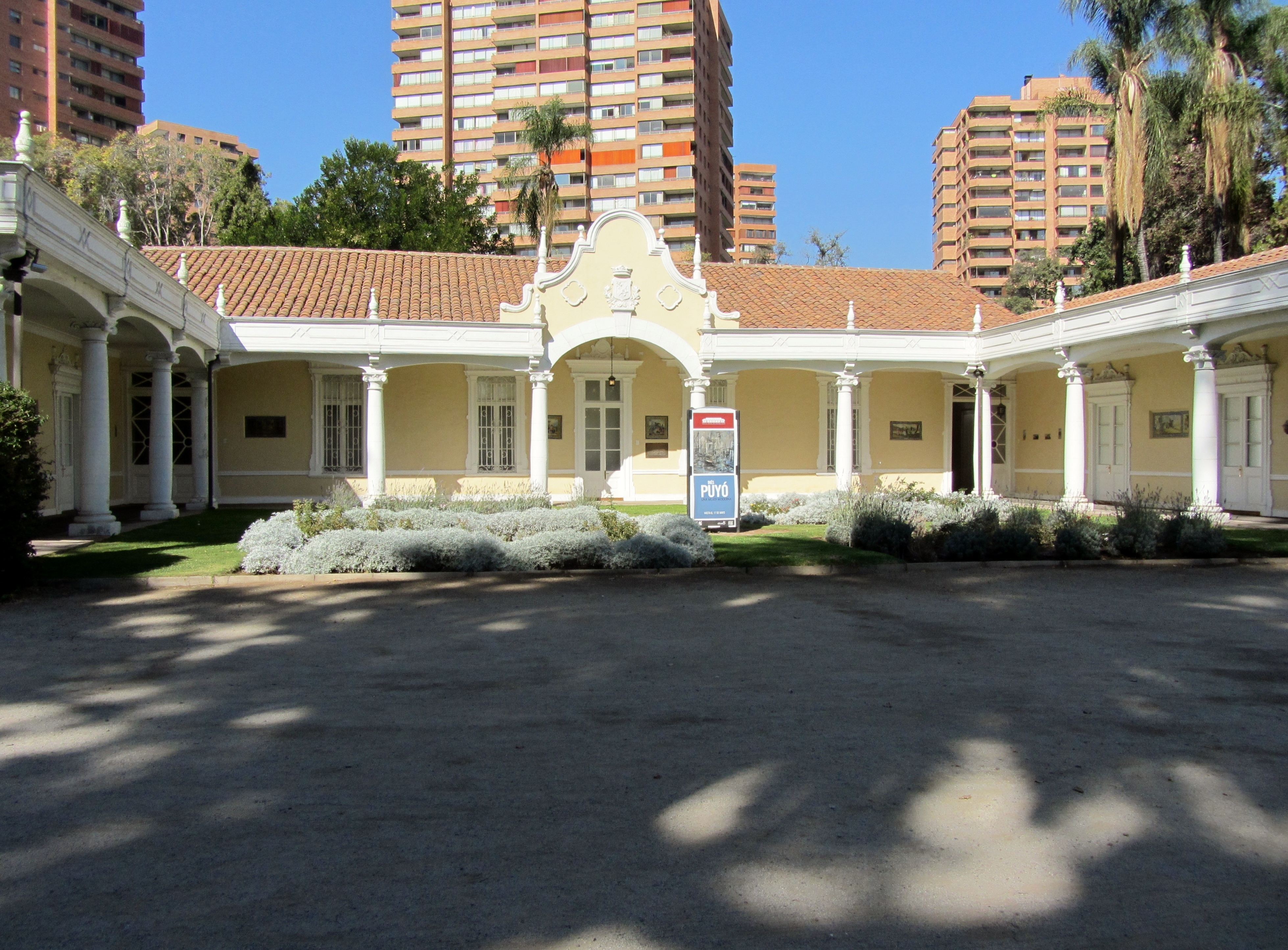 Casa Museo Santa Rosa de Apoquindo